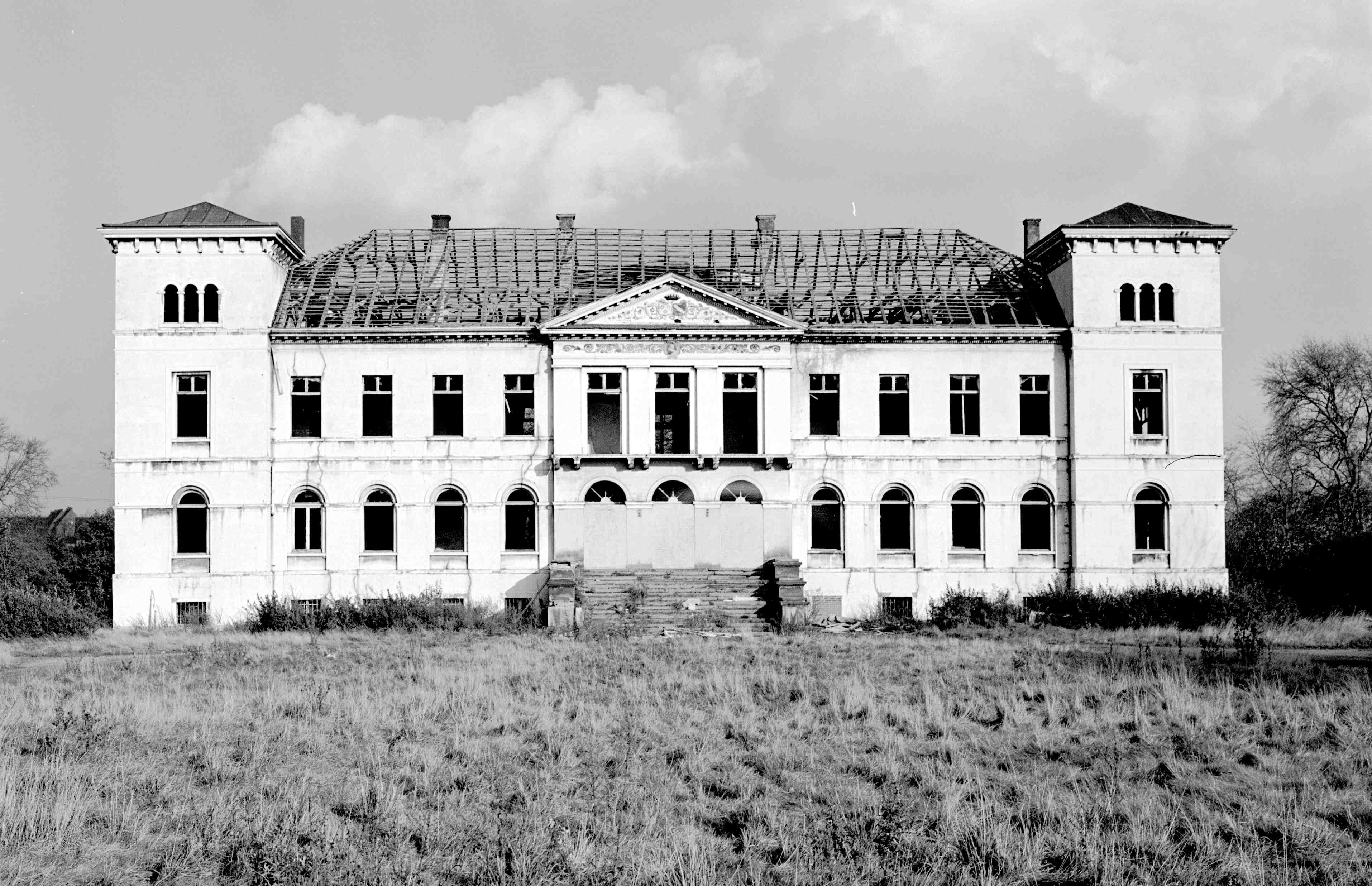 Haus Buddenburg in Lünen-Lippholthausen Anfang November 1977 kurz vor dem Abriss